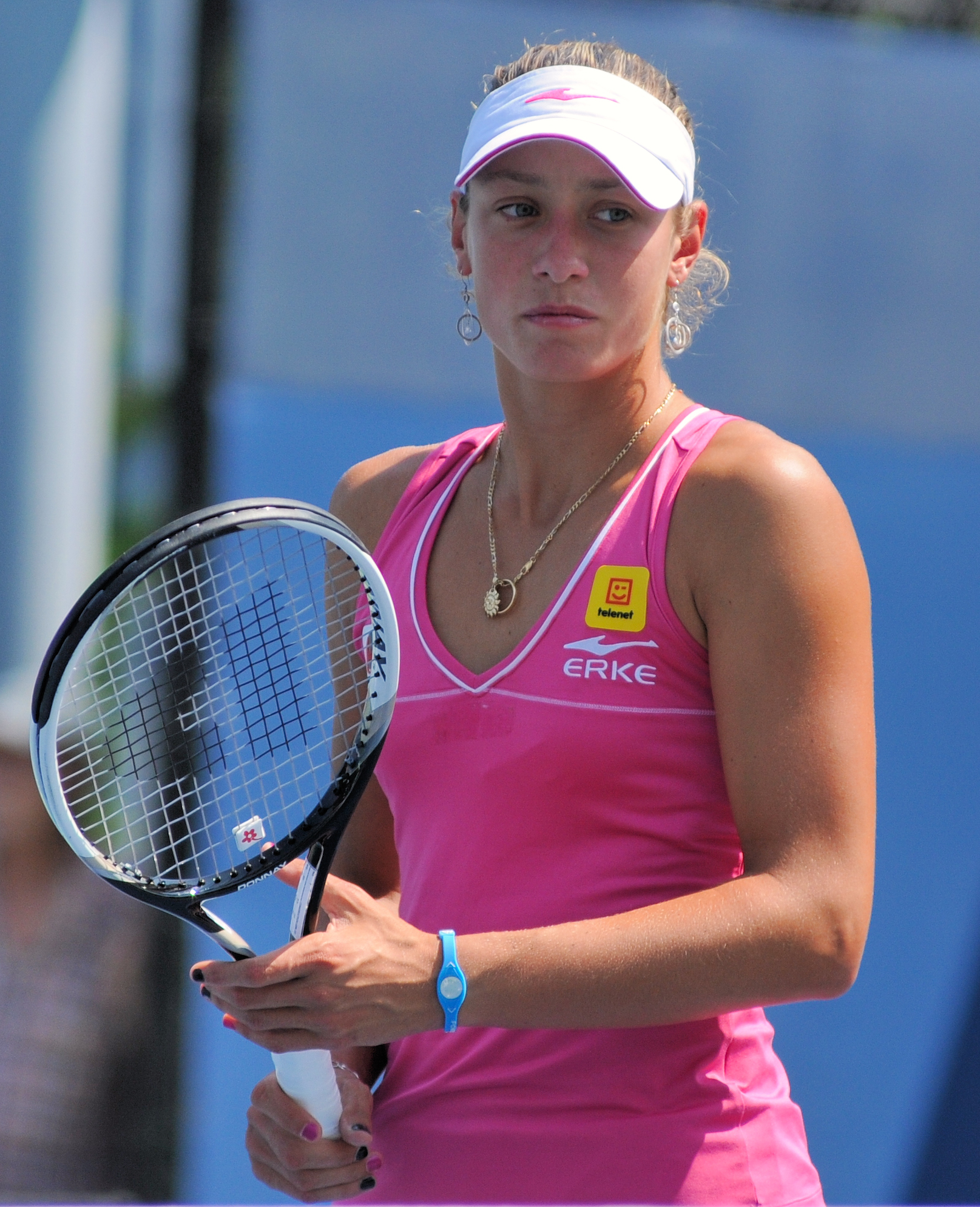 Yanina Wickmayer - US Open 2010